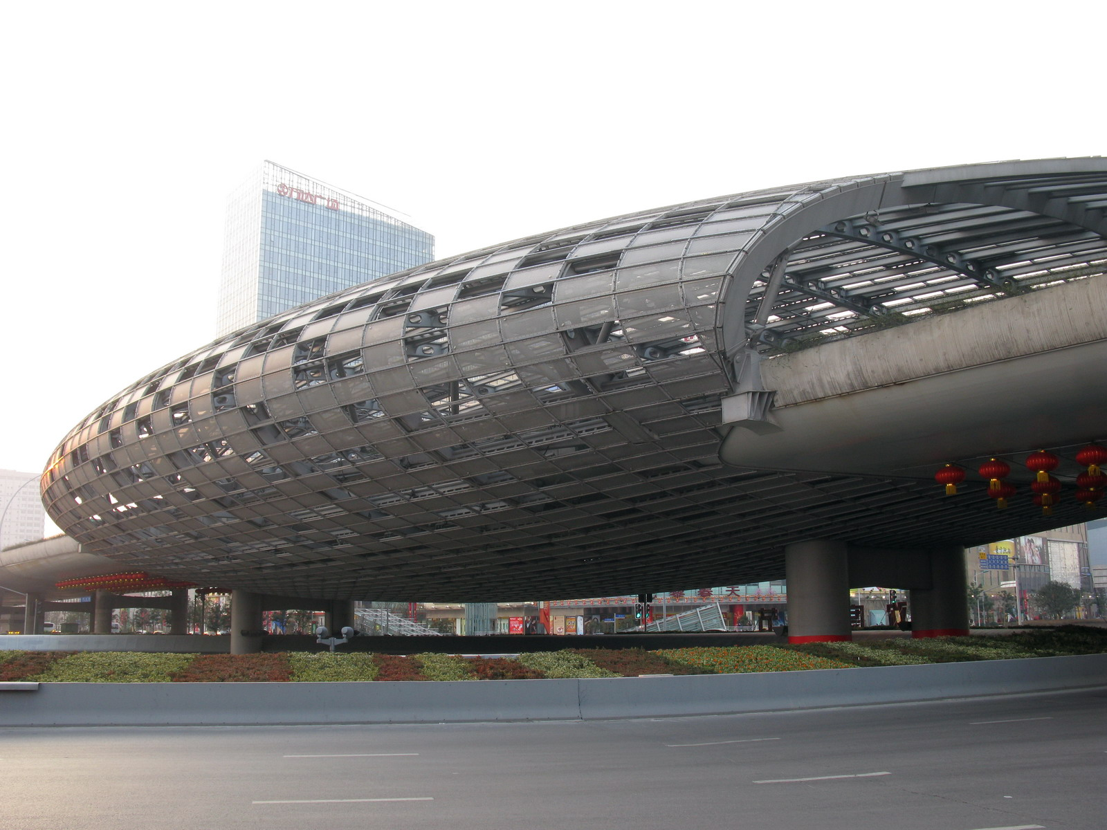 五角场巨蛋 Wujiaochang